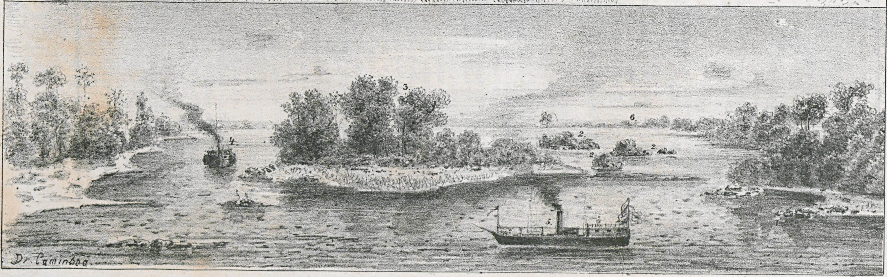 Exploração do Henrique Martins, Tamandaré, Mearim e Cysne, com o conselheiro Octaviano, visconde de Tamandaré, e general Mitre. Ponto d'onde voltou a esquadra. Legenda: 1. Puerto de Corrales; 2. Ilhas Pacurús; 3. Ilha Jaguary; 4. Vapor Henrique Martins; 5. Vapor Voluntario da Patria; 6. Itati.